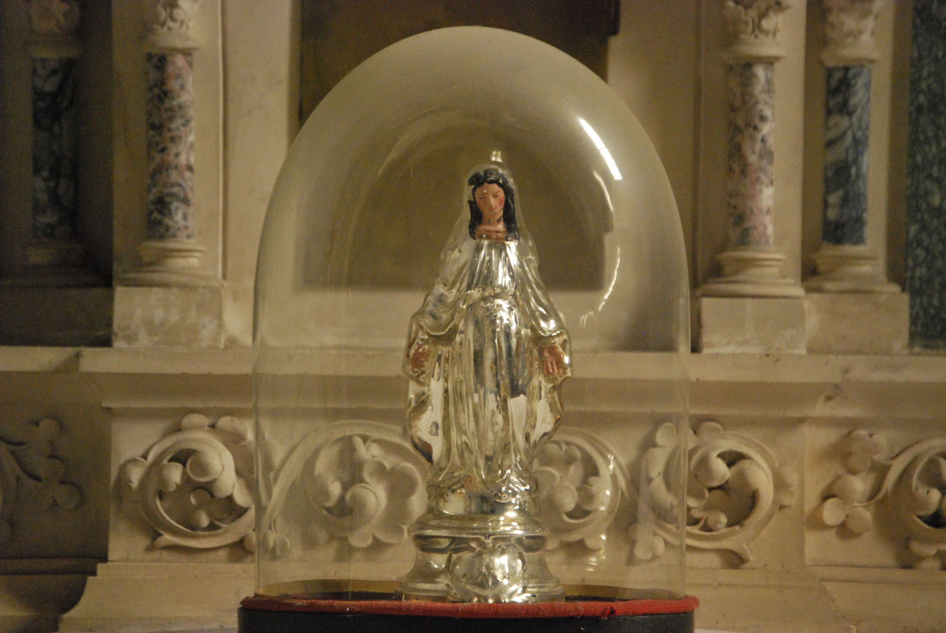 Statue en biscuit représentant la Vierge Marie.